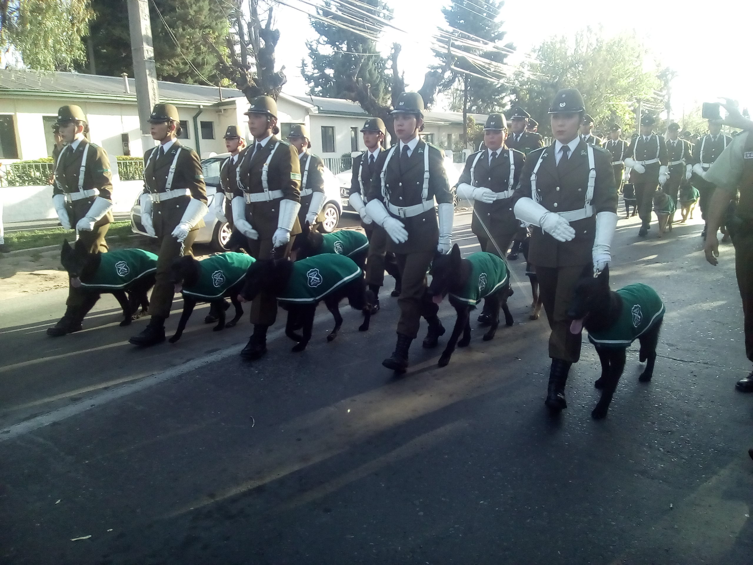 Perros de Carabineros de Chile especializados en rescatar personas bajos los escombros, en casos de edificios destruidos por terremotos, catástrofes humanos o naturales. Desfile el 19 de septiembre de 2016